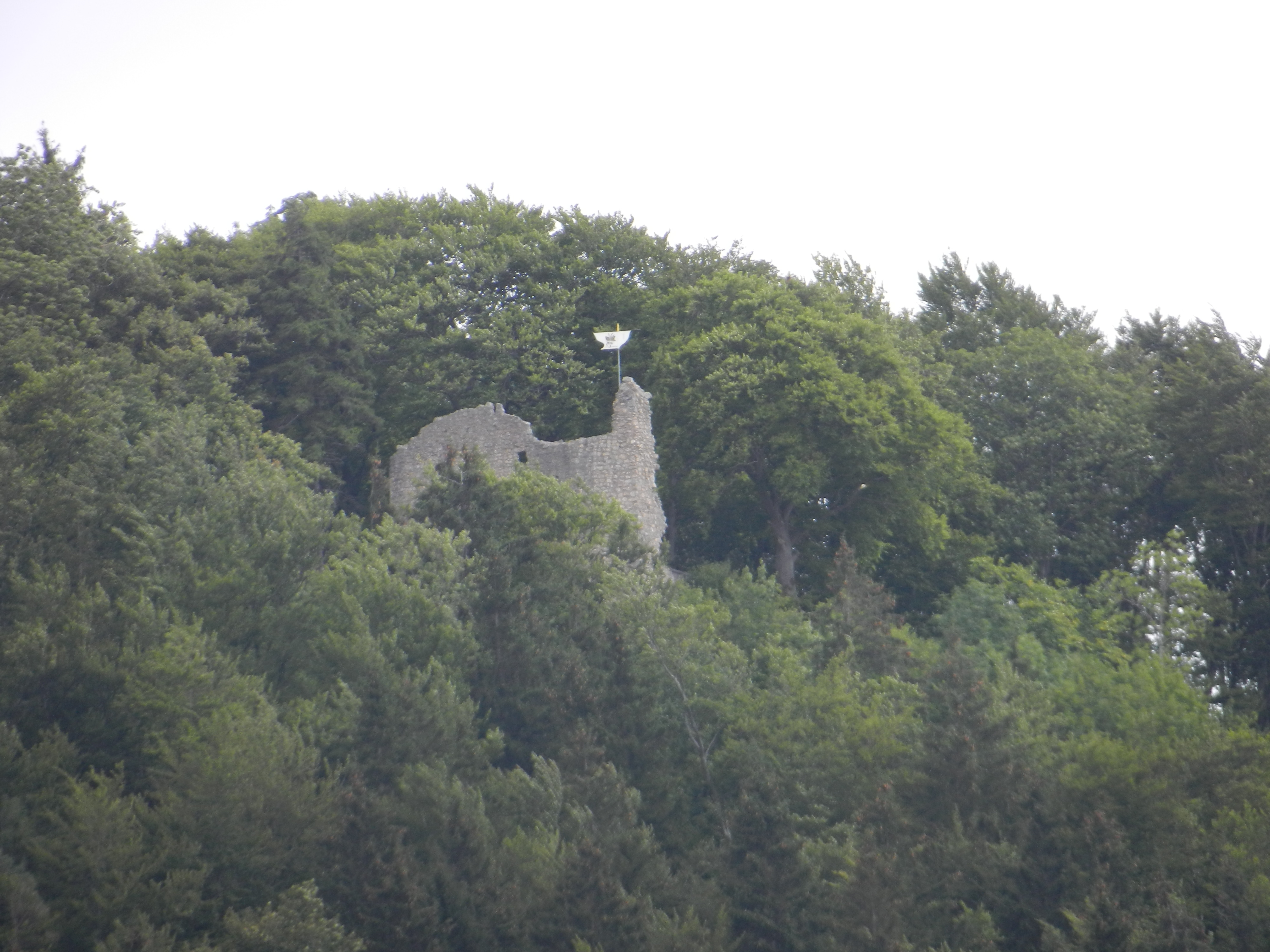 Ruine Stetten bei Stetten unter Holstein, Ortsteil von Burladingen